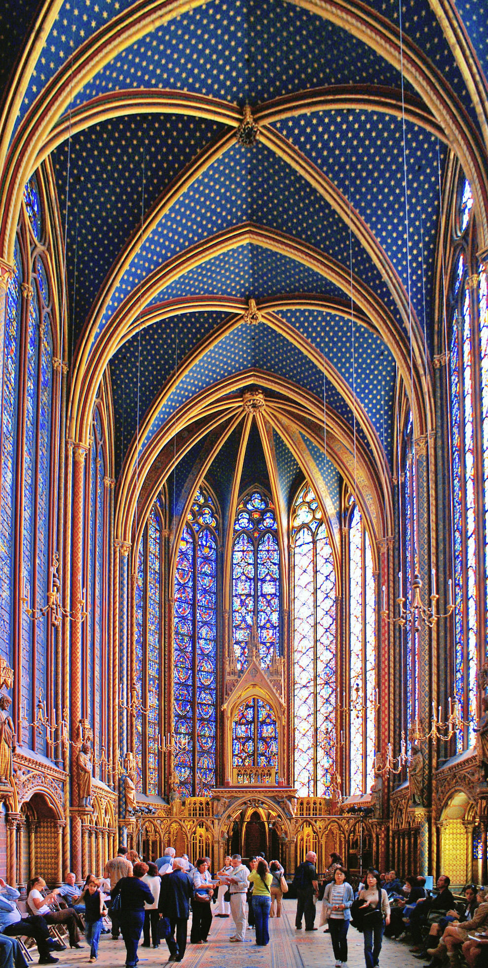 Sainte Chapelle - Upper Chapel, Paris, France